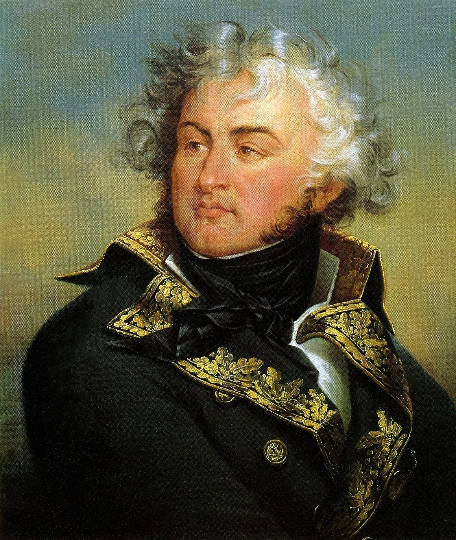 Portrait du général Kléber (1753-1800)